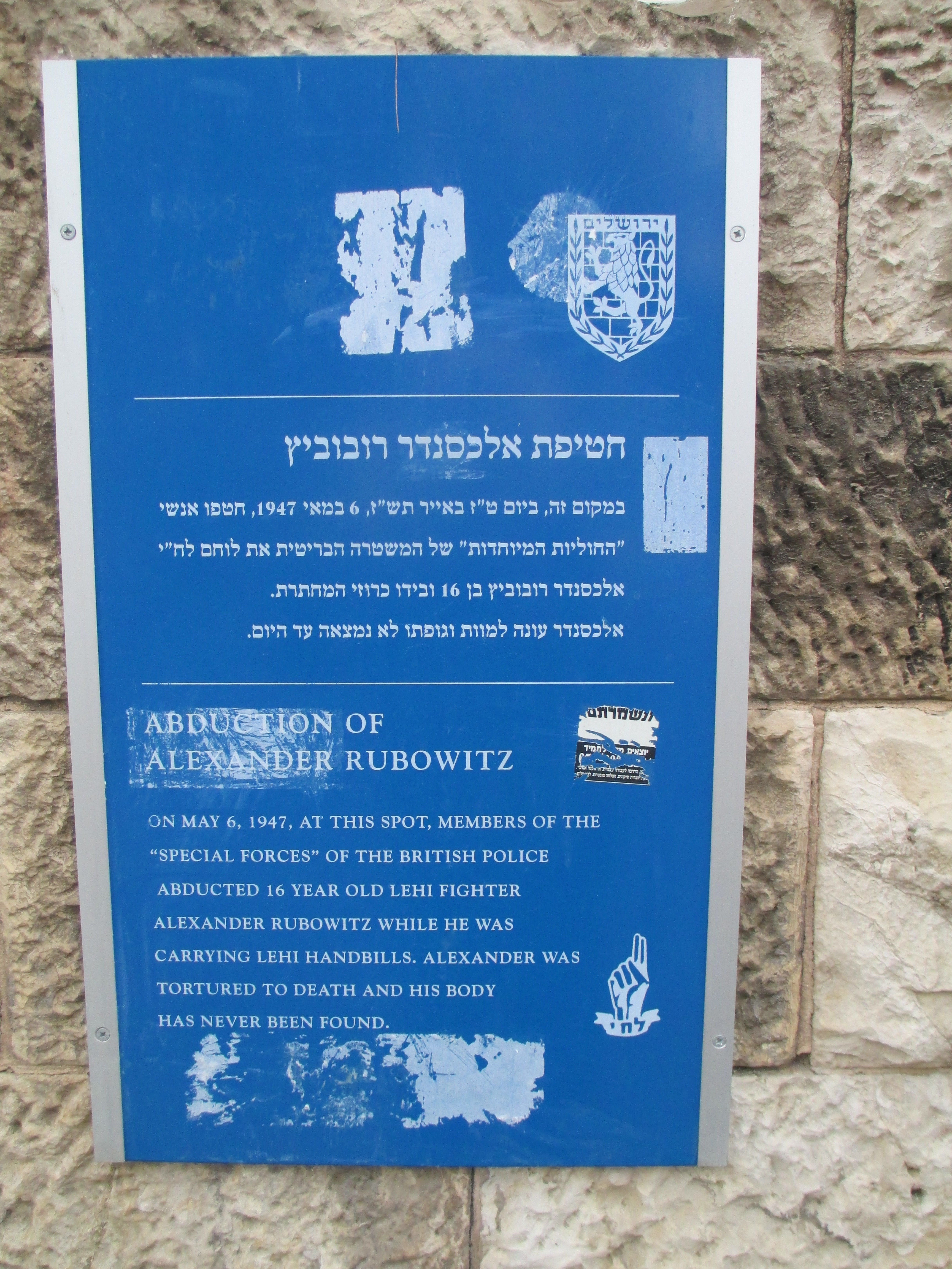 שלט זיכרון לחטיפת אלכסנדר רובוביץ ברחוב אוסישקין פינת קרן קיימת בירושלים